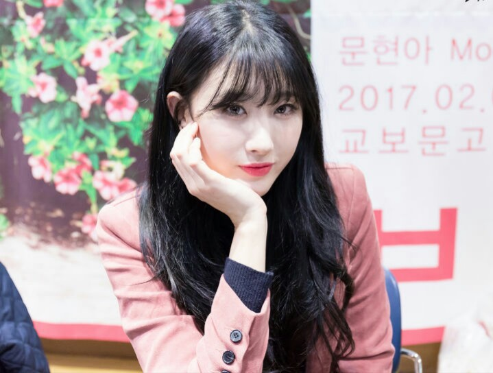 170204 교보문고 강남점 스위트 리메디 독자 사인회 문현아 직찍